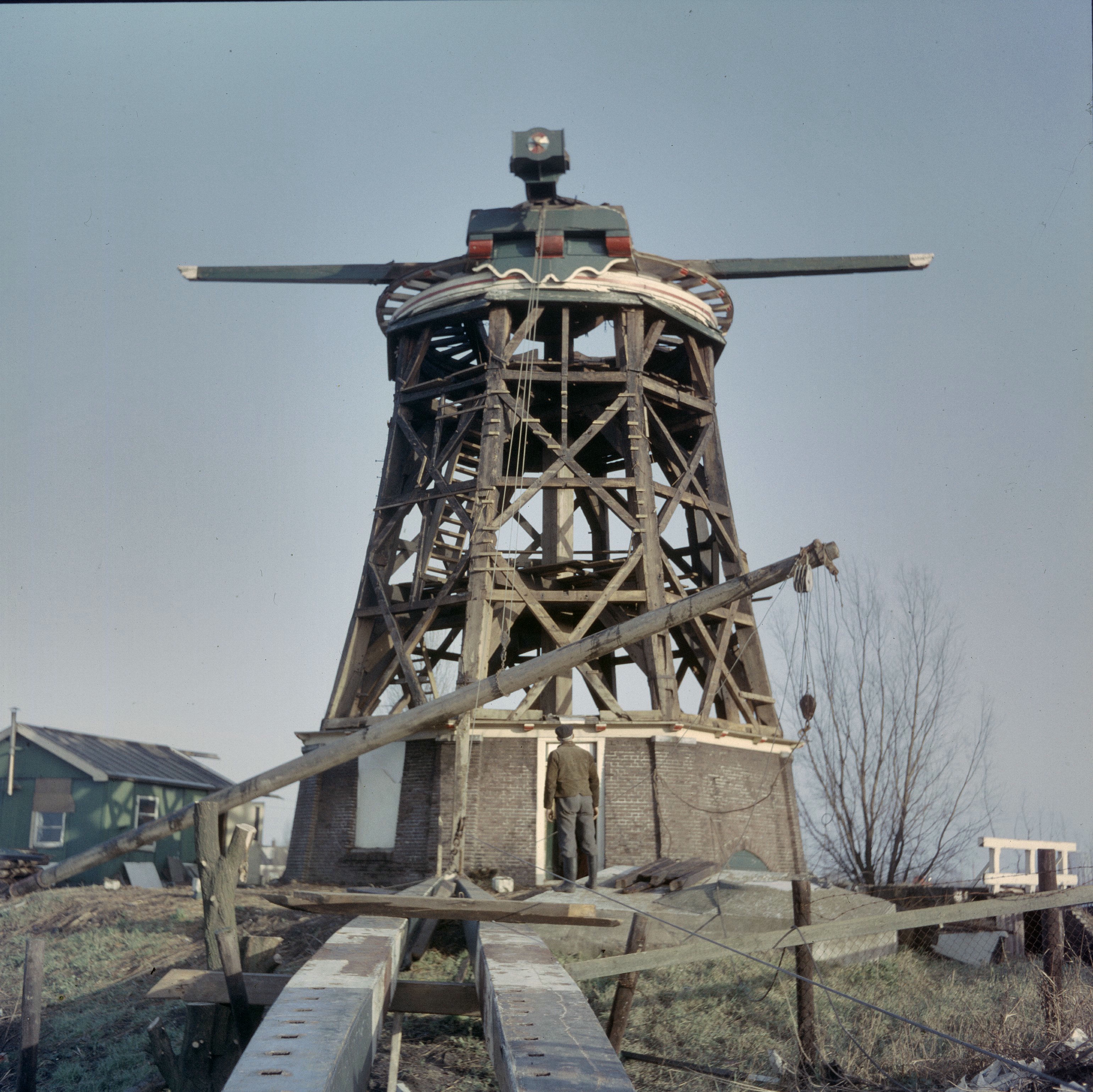 De 1100 Roe: Overzicht tijdens afbraak, in 1965 herbouwd op het Herman Bonpad 6 te Amsterdam (opmerking: Diacollectie Molens)